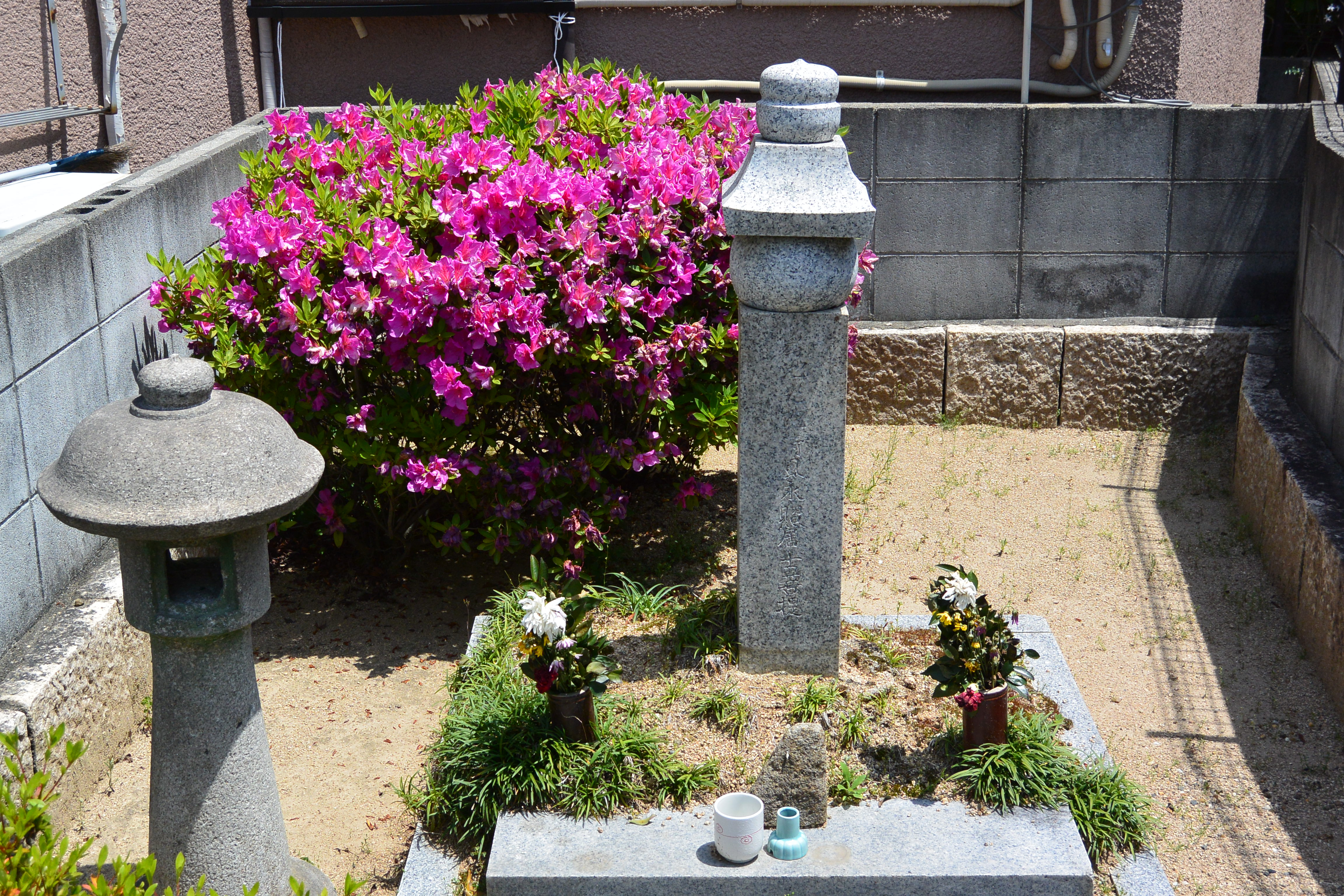 伊丹市池尻の昆陽井沿いにある首塚、昆陽井の水を盗んで殺害された人を祭る。 Nikon 1 AW1 + 1 Nikkor AW 11-27.5mm f/3.5-5.6